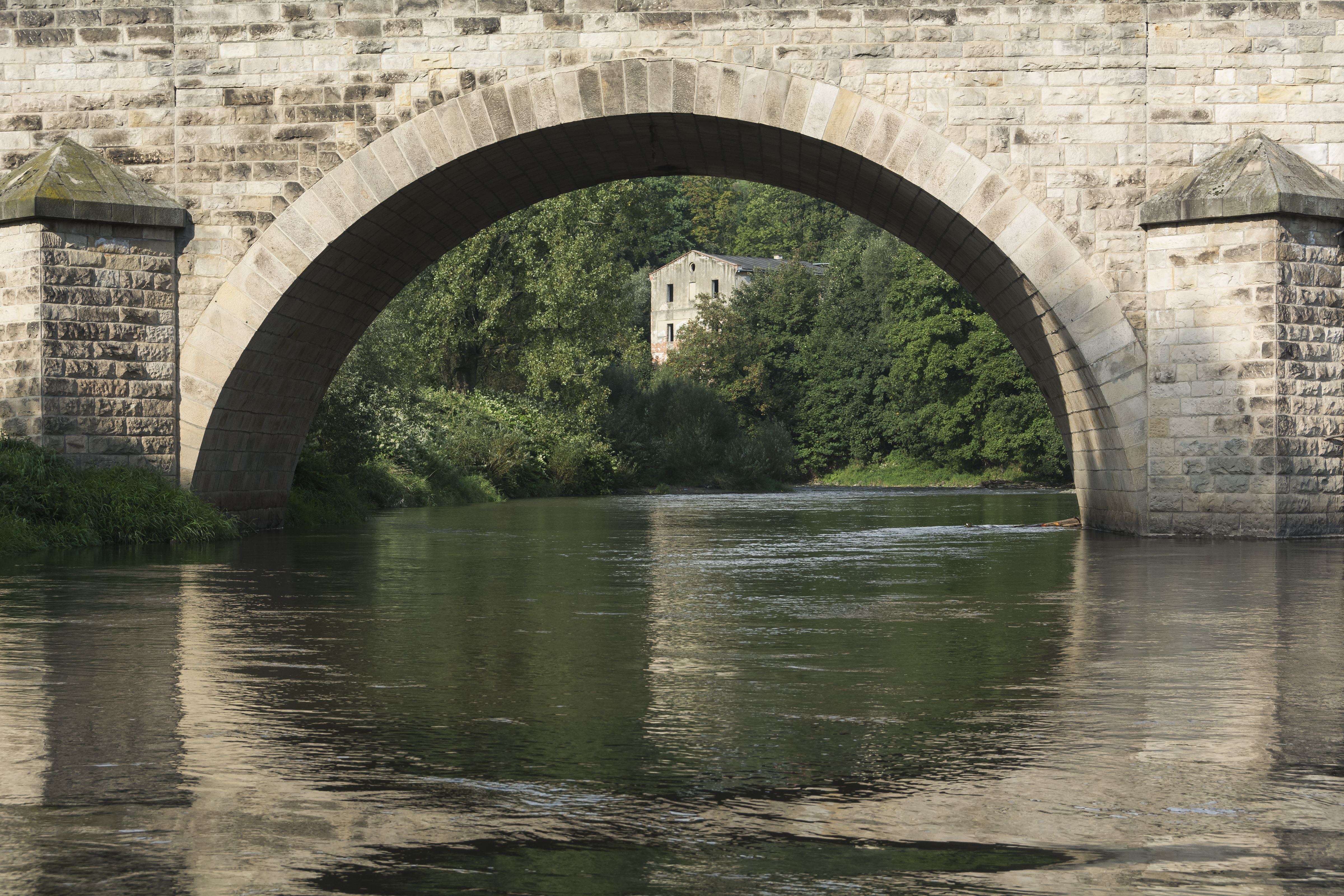 Bardo, most na Nysie Kłodzkiej, 1515